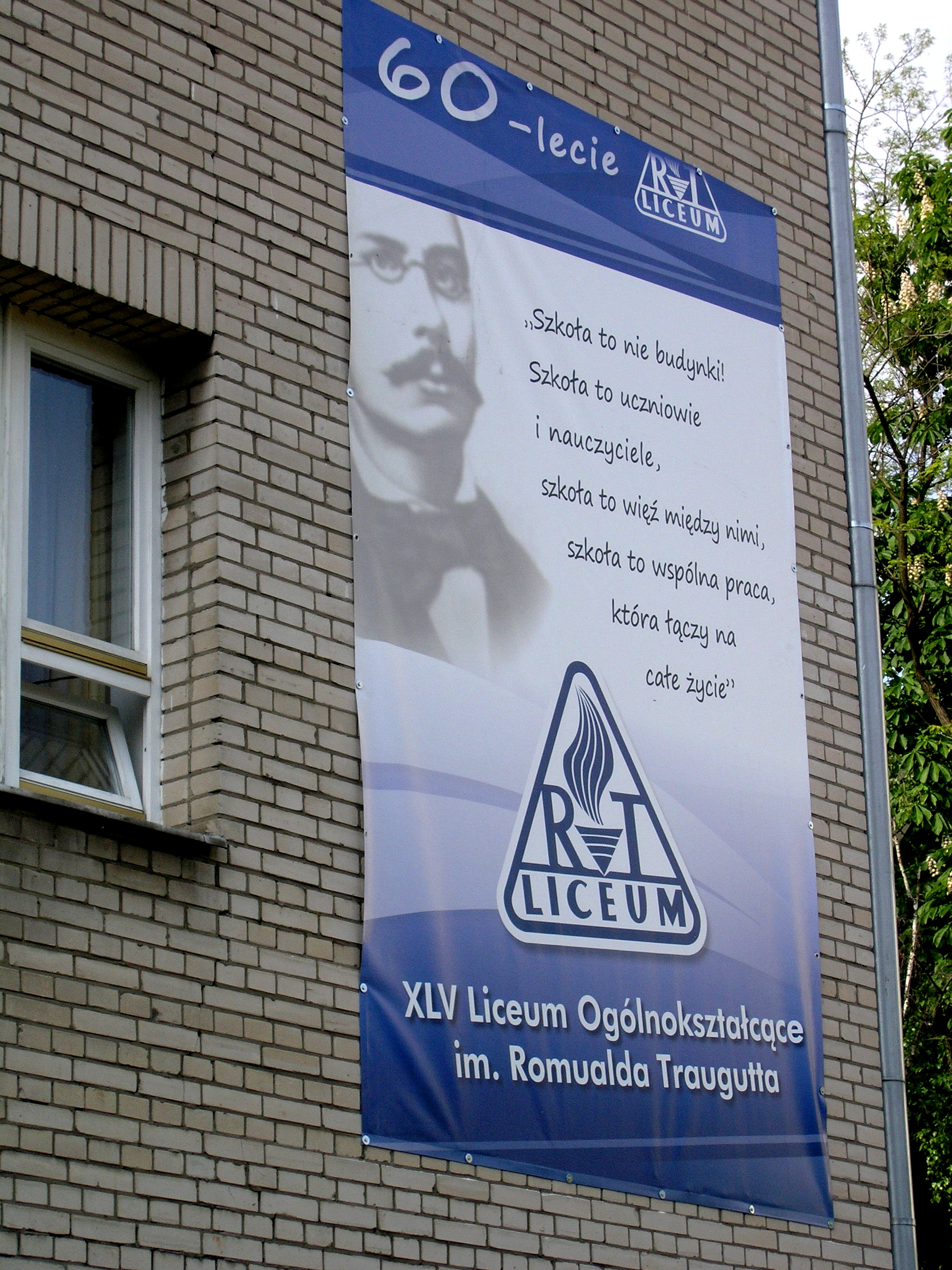 Baner z okazji obchodów 60-lecia szkoły na budynku XLV Liceum Ogólnokształcące im. Romualda Traugutta w Warszawie